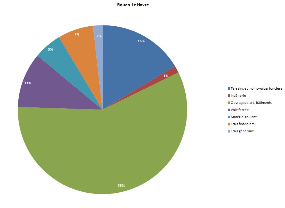 Part (en %) de chaque dépense dans le total des dépenses des travaux du Rouen-Le Havre.